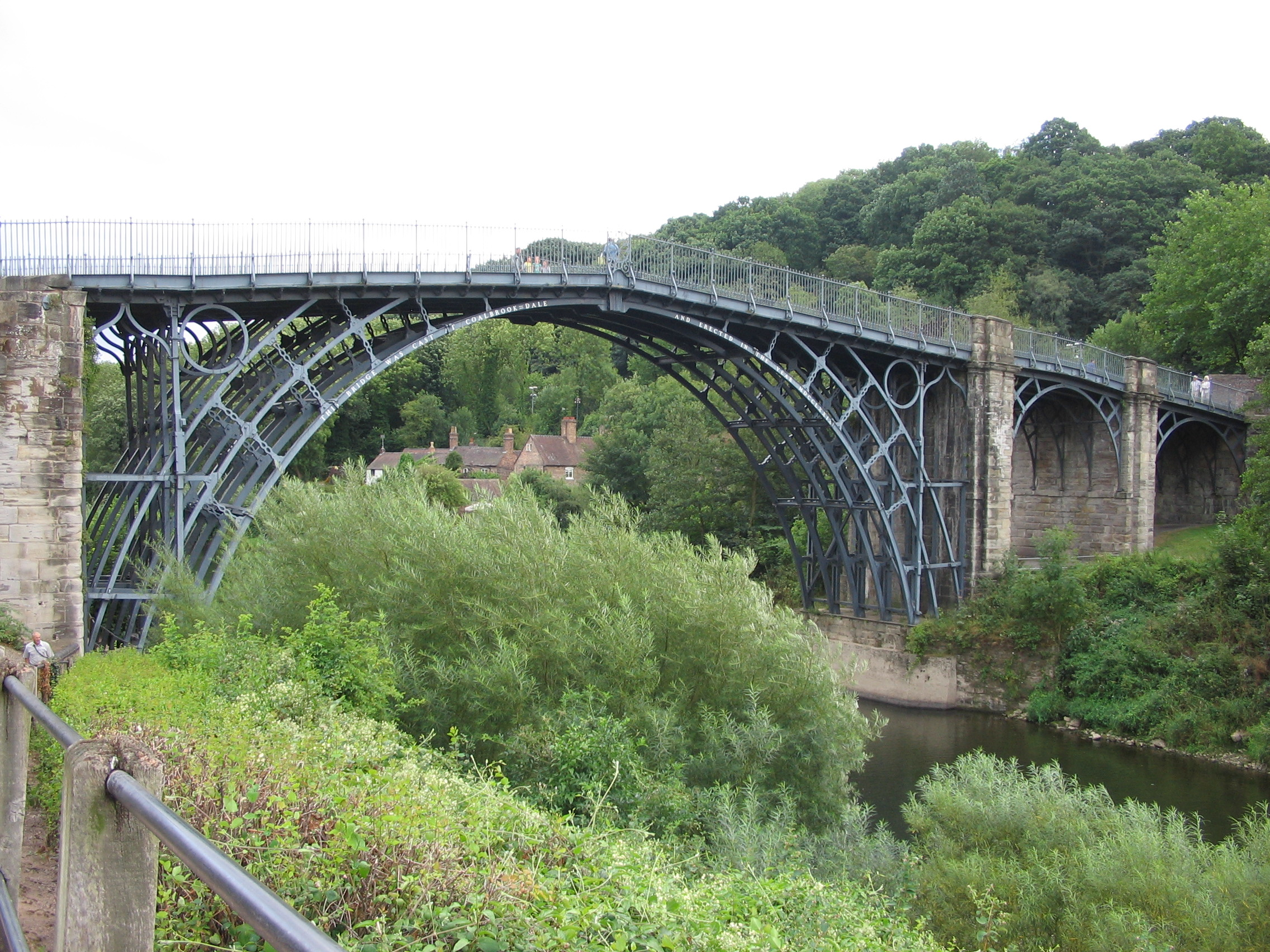 Iron Bridge over de Severn - zomer 2006 - eigen foto